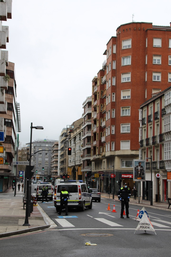 Gasteizko Aleak egindako argazki sorta, COVID-19aren eraginez hartutako neurriena. Argazki guztiak ikusgai helbidean.